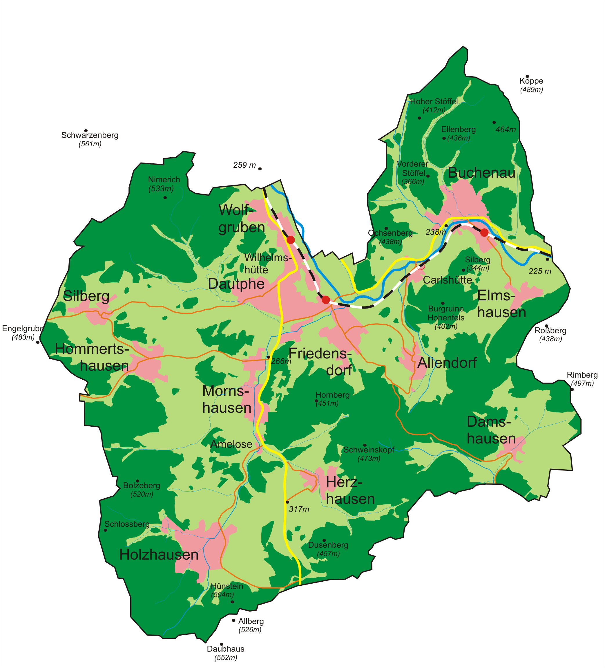 Übersicht über die Gemeinde Dautphetal (Berge ergänzt--Elop 12:44, 5 October 2006 (UTC)